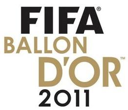 Logotipo de Balón de Oro